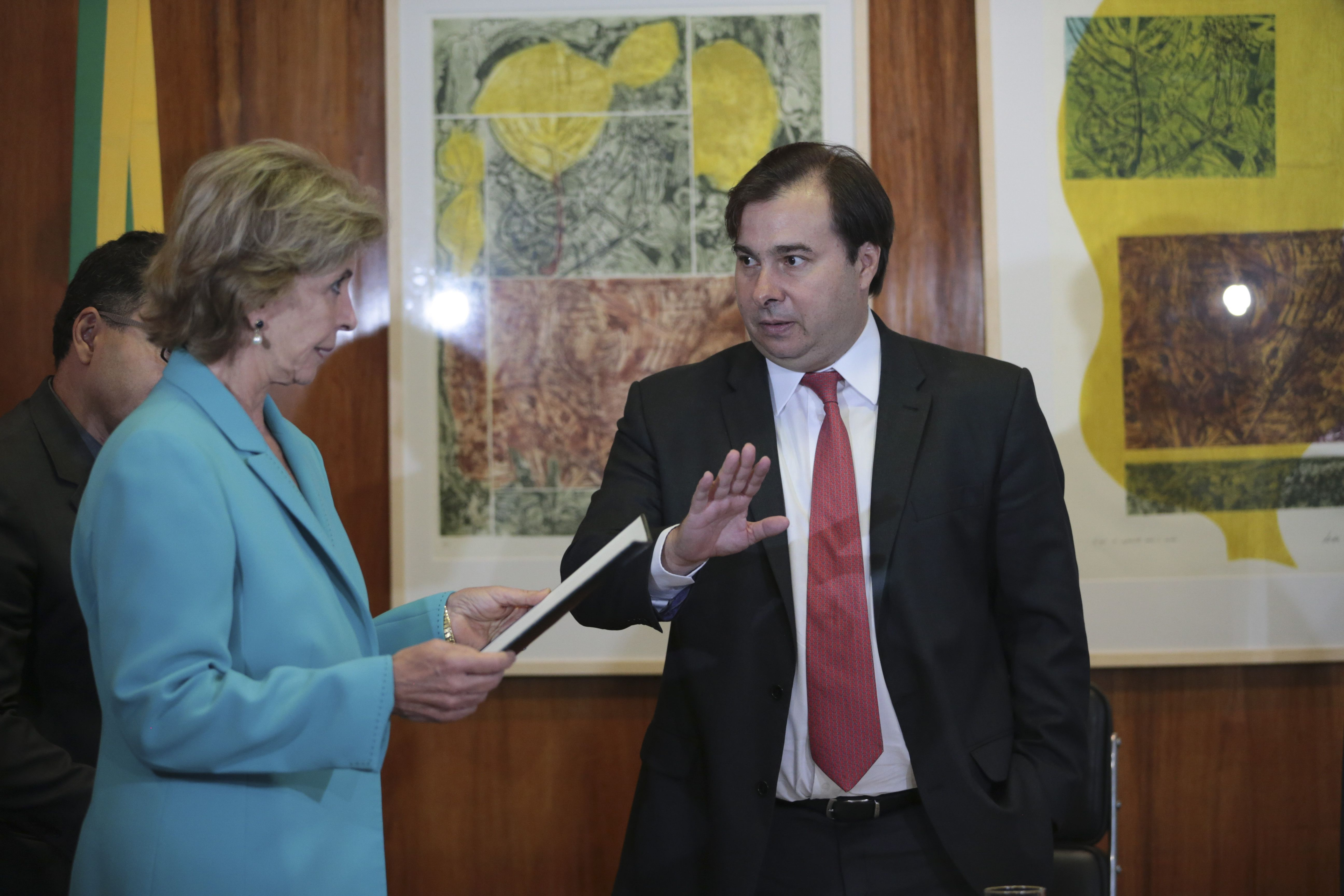 Rodrigo Maia empossa Yeda Crusius na Câmara dos Deputados.